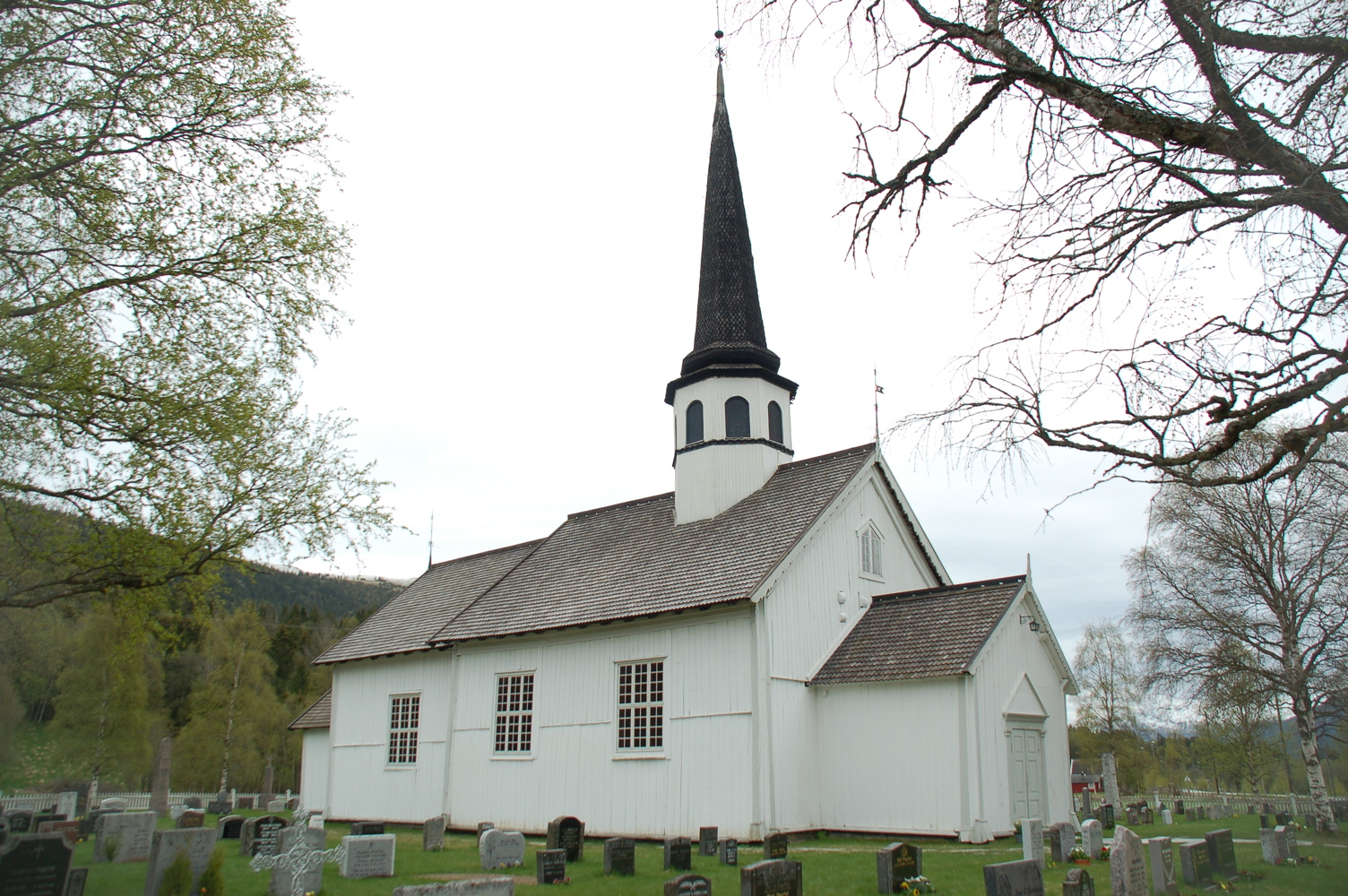 Tylldal Church, Tylldalen, Tynset, Hedmark, Norway